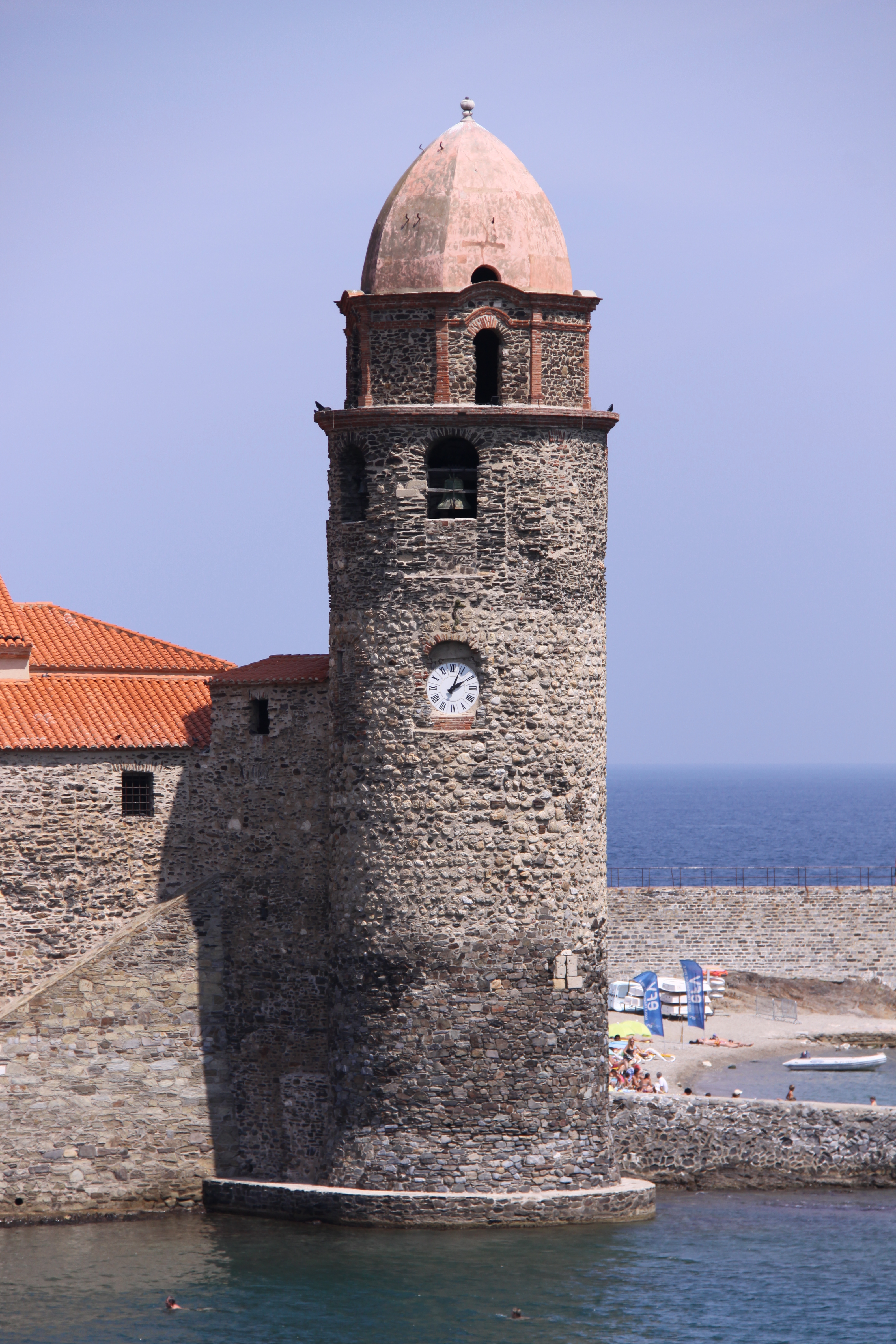 L' église Notre-Dame-des-Anges de Collioure, la célèbre tour attenante qui sert de clocher à l' église. Monument Historique classé en 1923. PA00104000. Collioure, Pyrénées-Orientales, France.